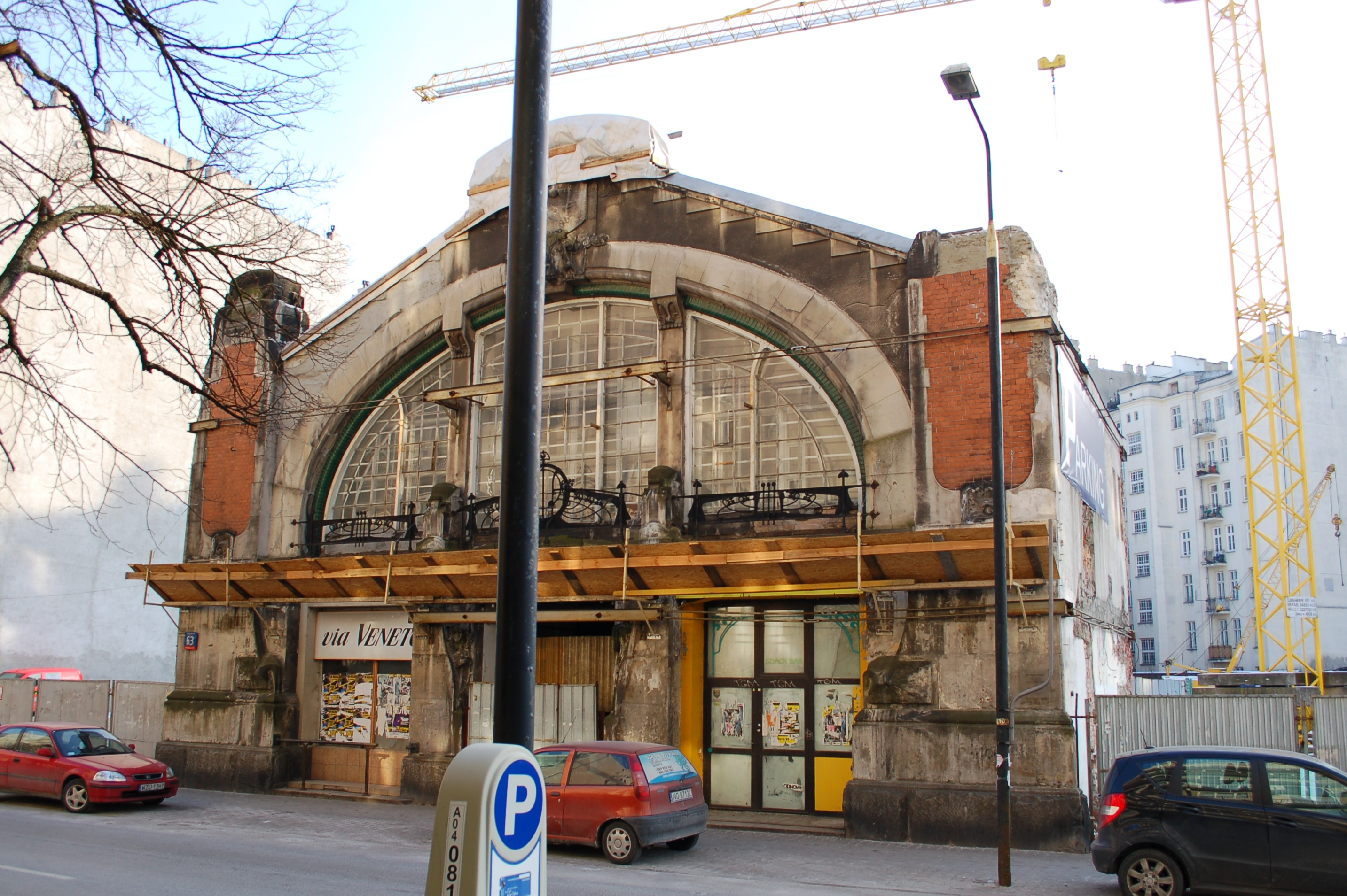 Koszykowa Market Halls in Koszykowa Street in Warsaw, under demolitian/reconstruction, january 2012